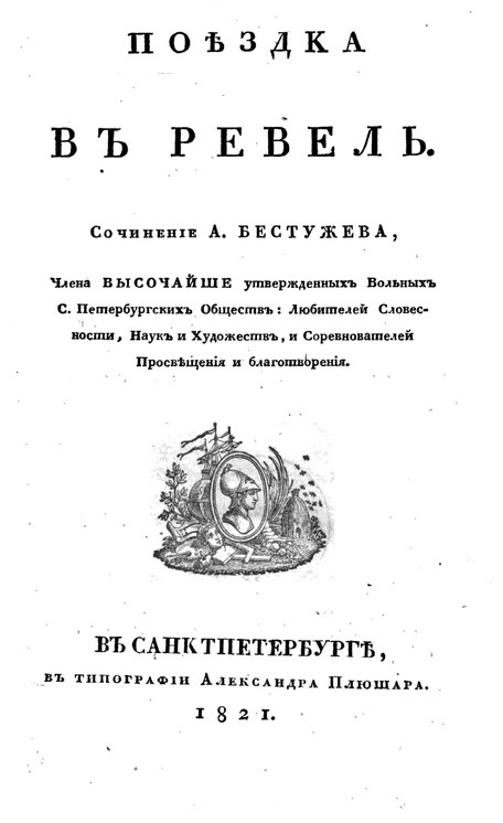 Poezdka v Revel Bestuževa-Marlinského